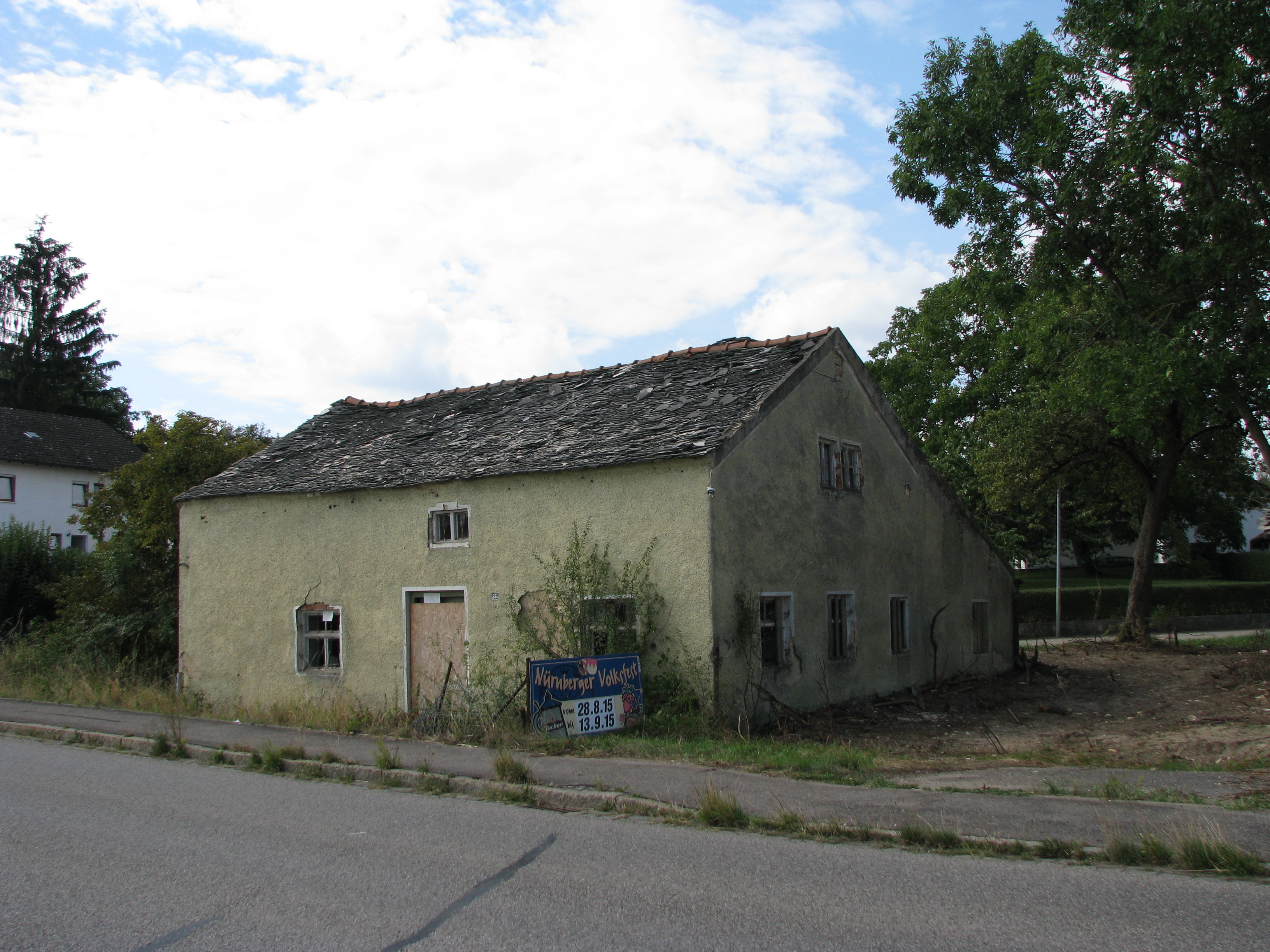 Jurahaus mit tradtionellem Kalkplattendach in Grampersdorf, Gemeindeteil von Beilngries im Landkreis Eichstätt